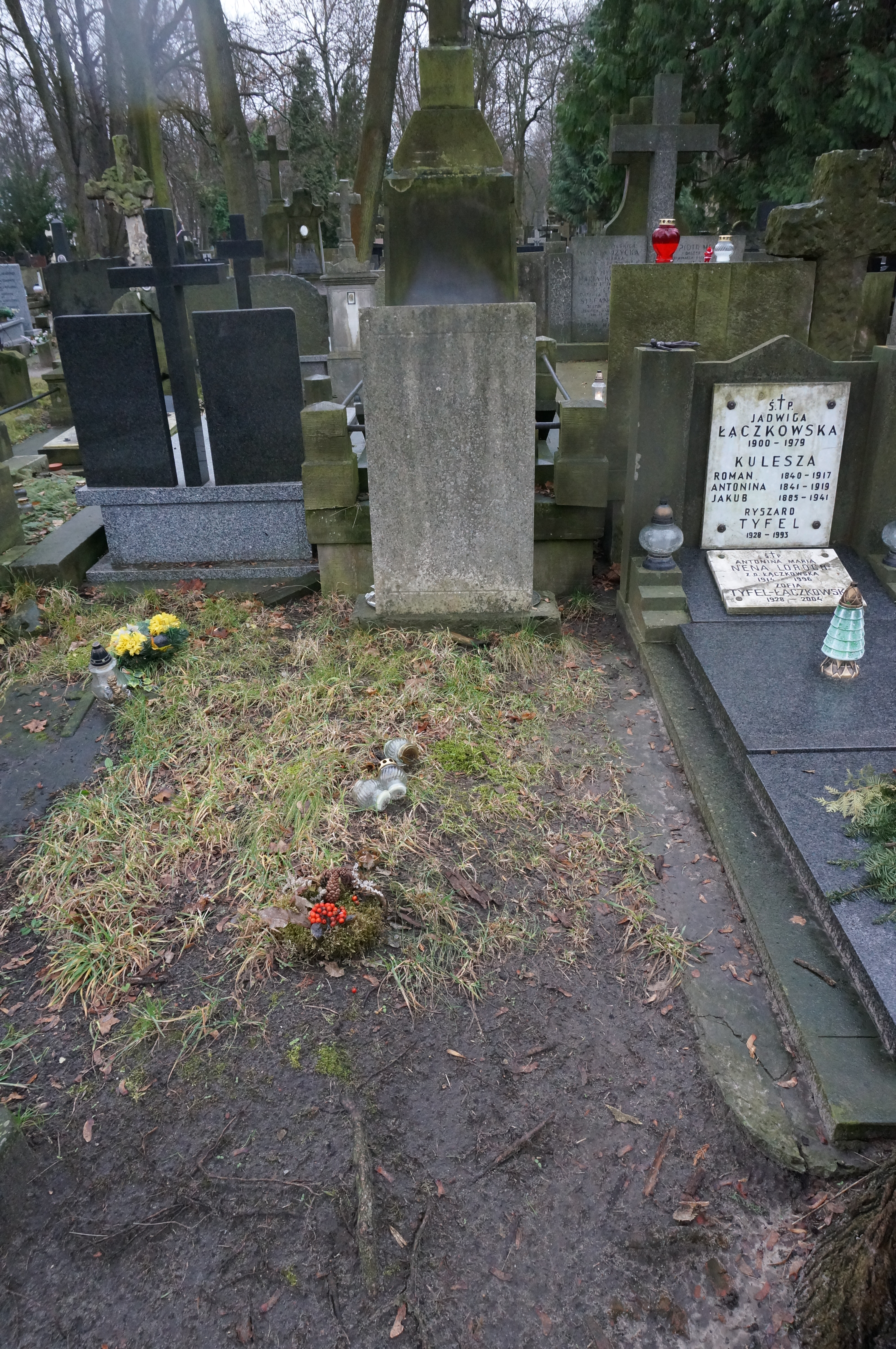 Grób Ireny Kosmowskiej na Cmentarzu Powązkowskim (kwatera 57, rząd 6, grób 11)